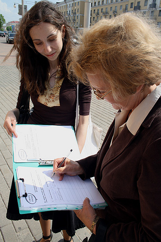 Сбор подписей за улицу Быкова 13.05.2010